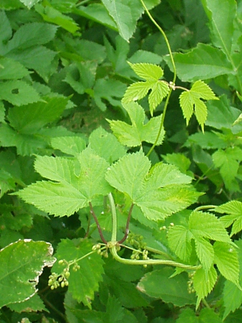 Wilder Hopfen